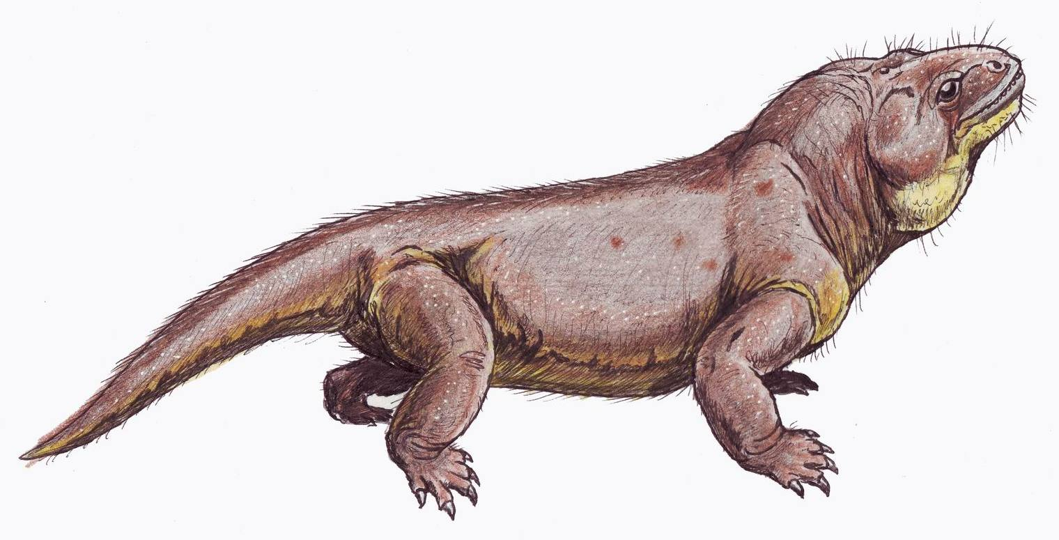 Venjukovia prima